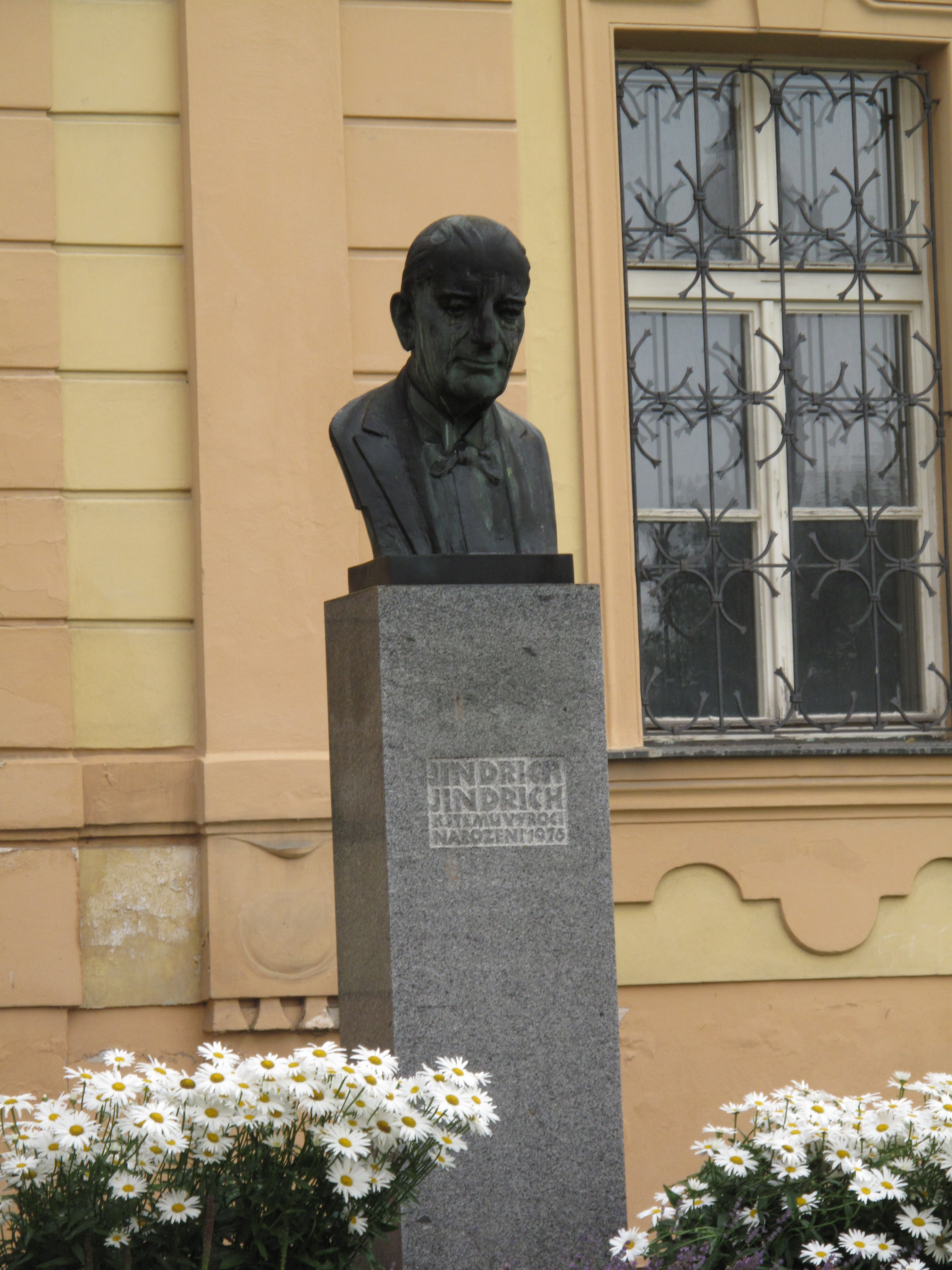 Domažlice